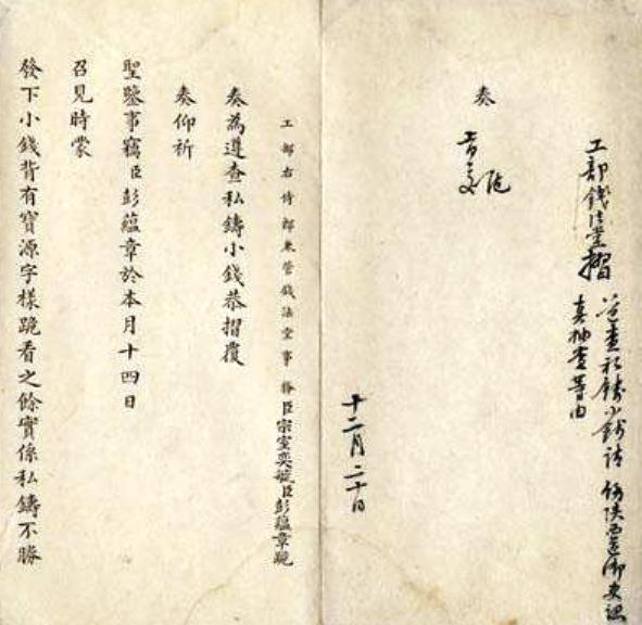 宗室奕毓偕彭蘊章奏為遵查私鑄小錢請飭陝西道御史認真抽查摺